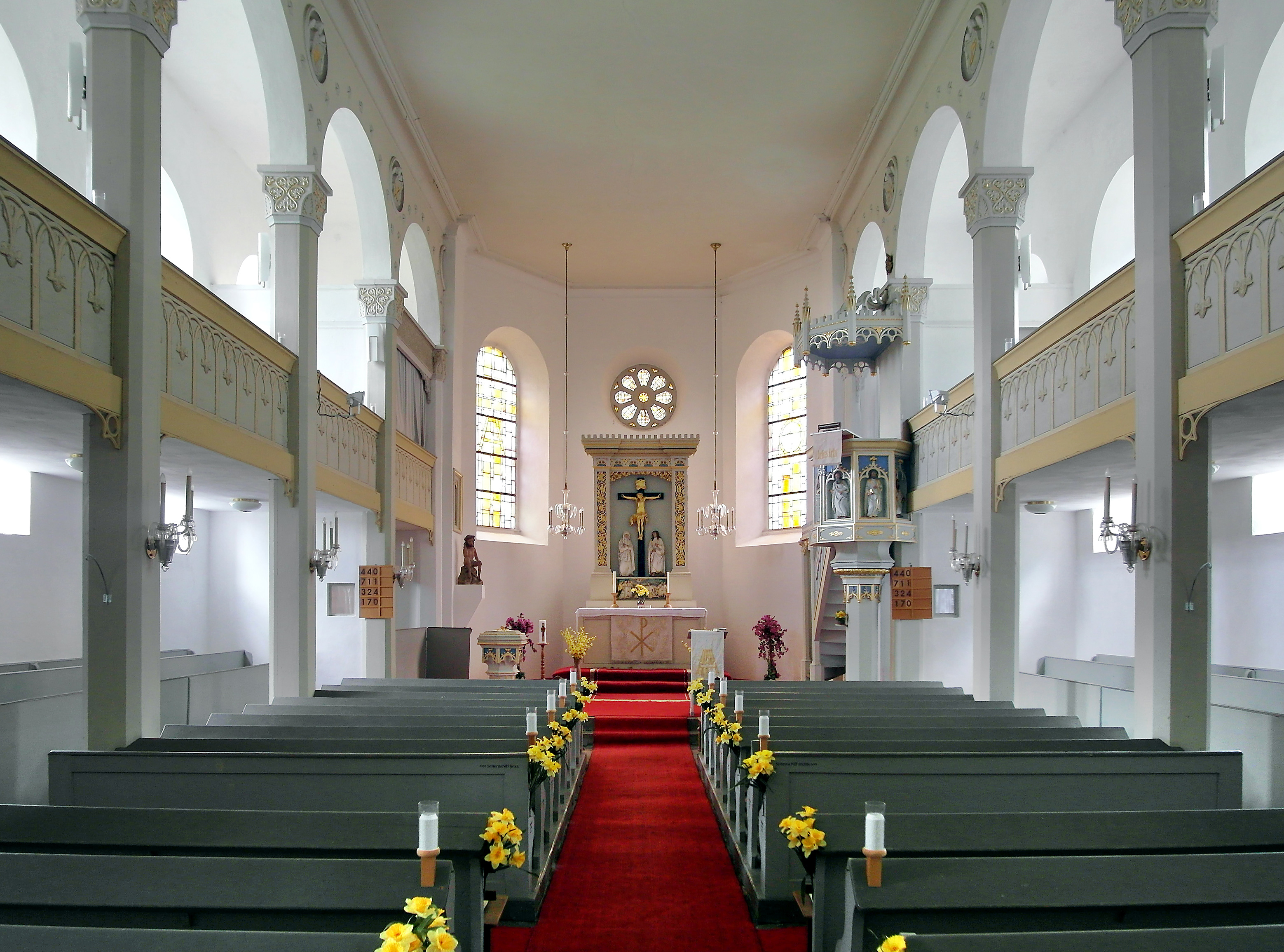 10.06.2015 09600 Wegefarth (zu Oberschöna): Kirche [SAM0820.JPG]20150610320DR.JPG[c)Blobelt